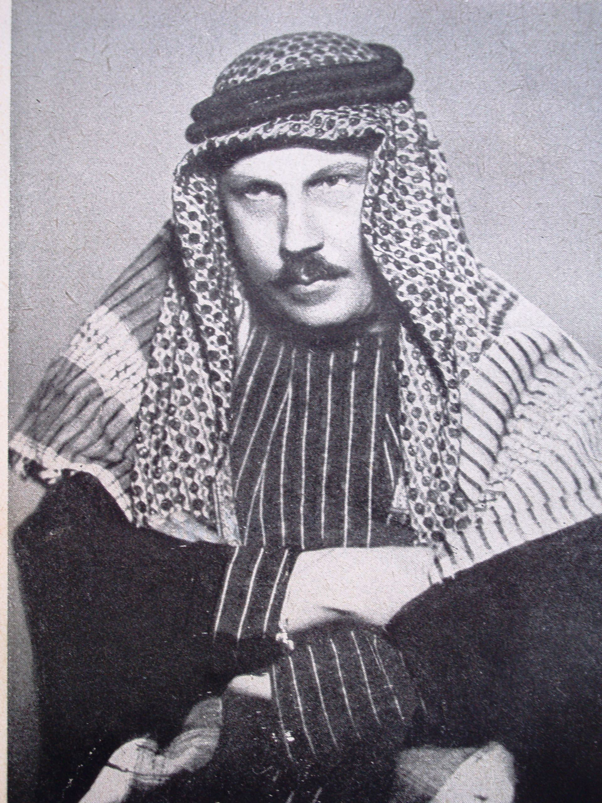 Ing Václav Zelenka - etnograf a cestovatel